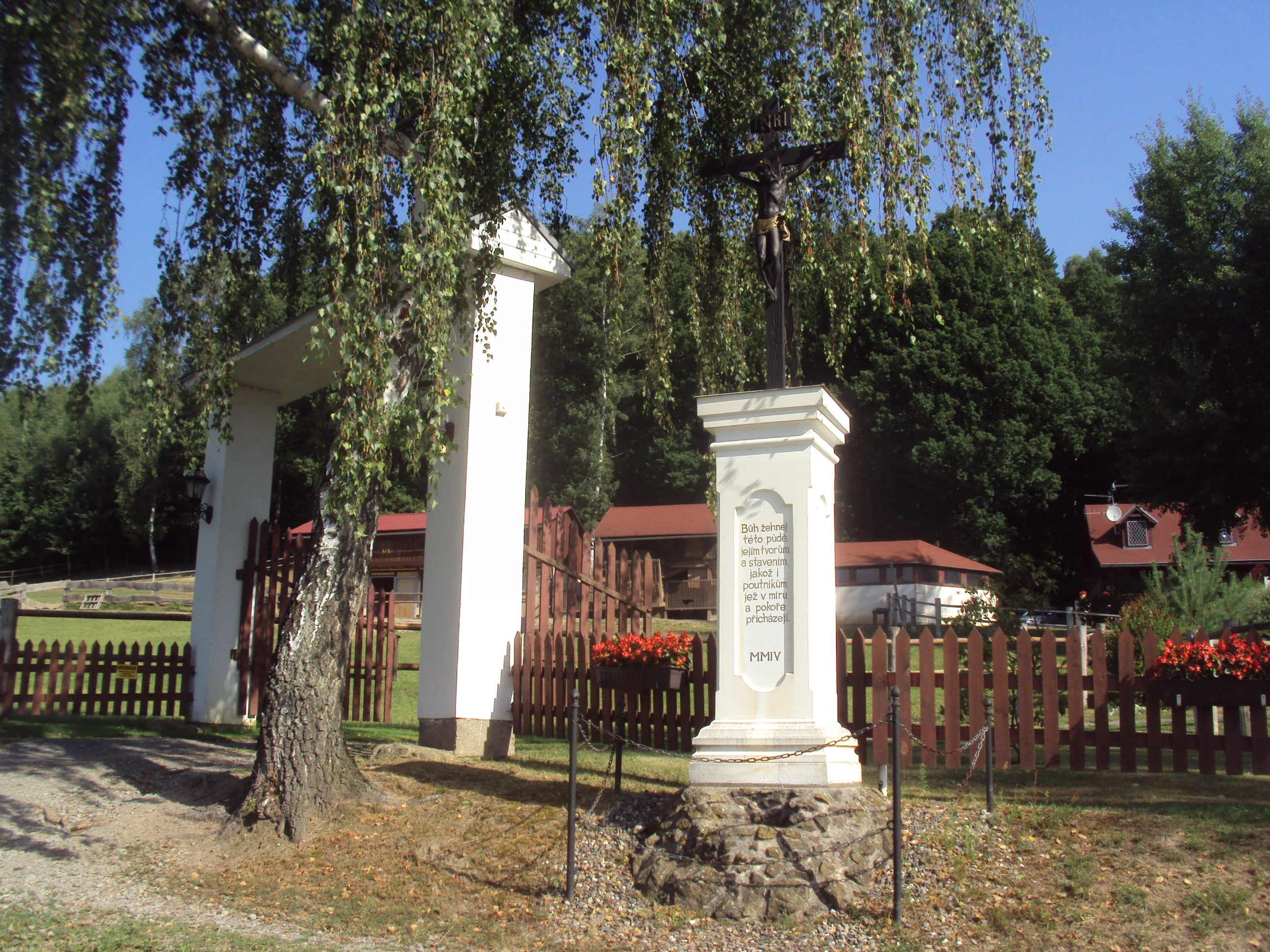 Na patě, už ve svahu Pomahačova vrchu